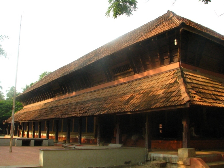 Punathur Kotta at Kottapadi near Guruvayur, Kerala